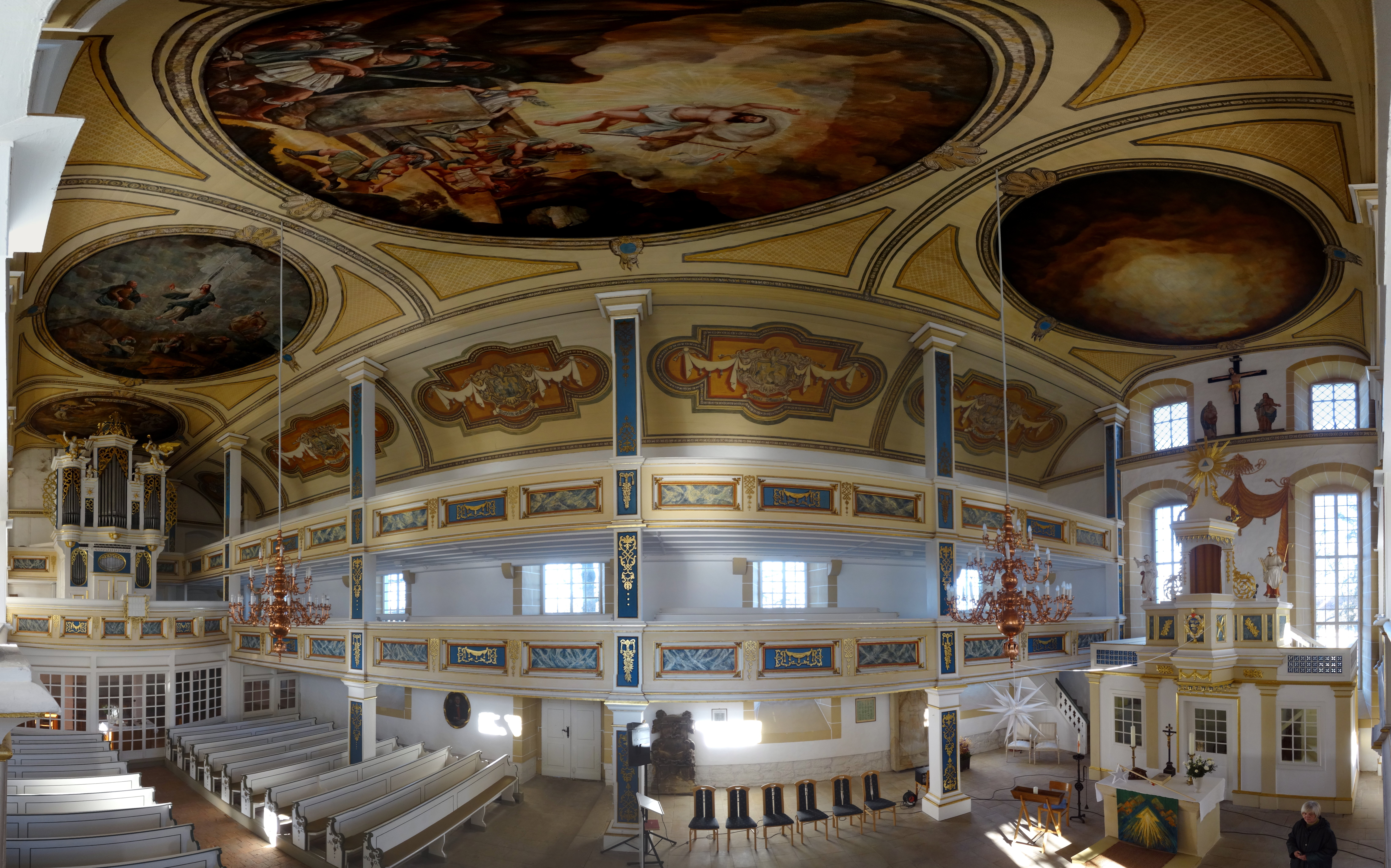 Barockkirche St.Trinitatis Gräfenhain Innenraum-Panorama. Die qualitätvolle Innenausstattung schufen der Gothaer Hoforgelmacher Christoph Thielemann (1731 – Orgel), der gothaische Bildhauer Graff (1731 – figürlicher Schmuck des Orgelprospektes), der gothaische Hofmaler Georg Conrad Dörffling (1744 - Gestaltung von Kanzelaltar und Orgelprospekt) sowie der Arnstädter Hofmaler Gottfried Wunderlich (1745 – Deckenbilder).